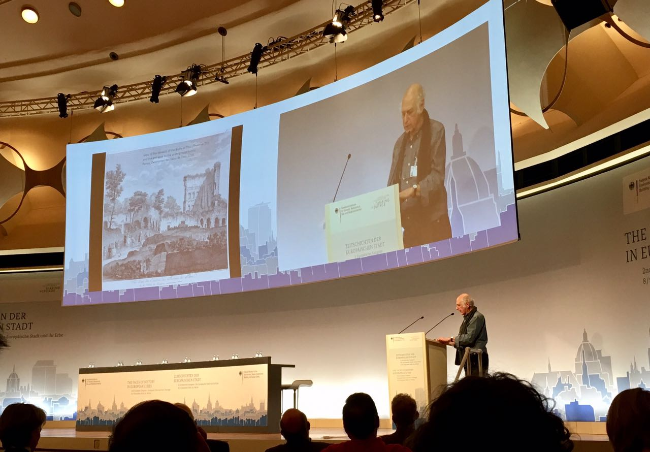 Keynote lecture at the 2nd European Congress - European Cities and their Heritage in Berlin 2016 'Faces of History in European Cities'